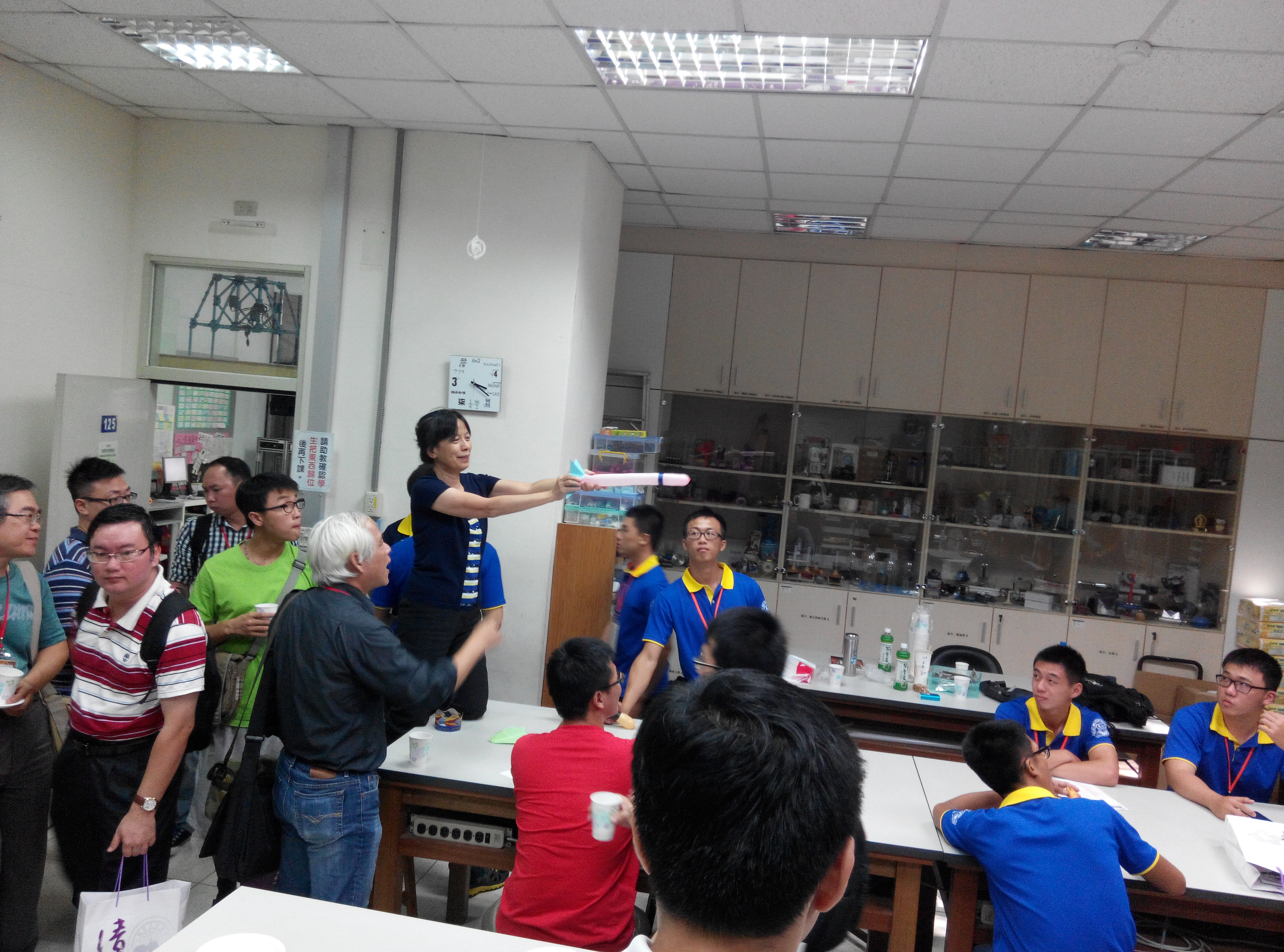 國立清華大學物理學系戴明鳳教授，施放氣球火箭中。2014 物理教育推廣獎得主。